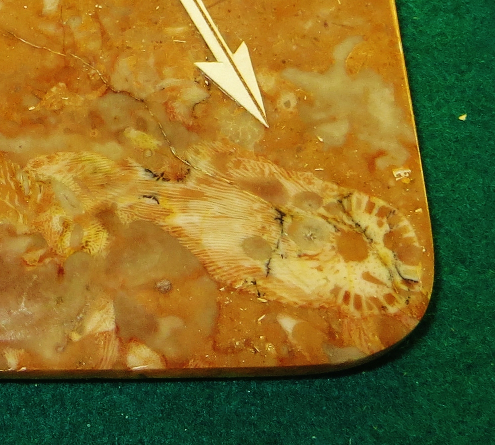 Fossil of Metaldetes, an extinct archaeocyathian- Took the picture at Museo di Storia naturale “Antonio Stoppani” - Venegono Inferiore